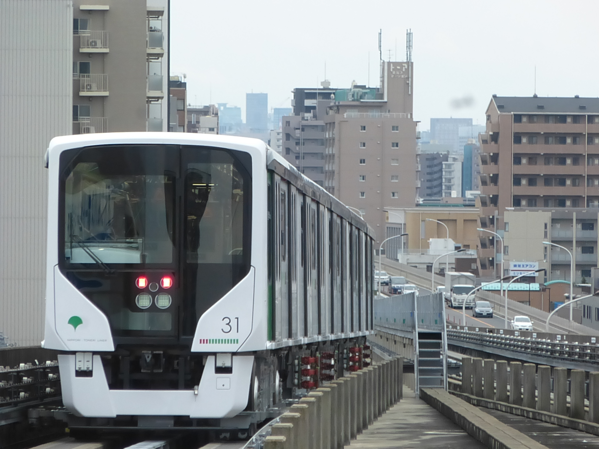 日暮里・舎人ライナー用東京都交通局330形電車。足立小台にて。